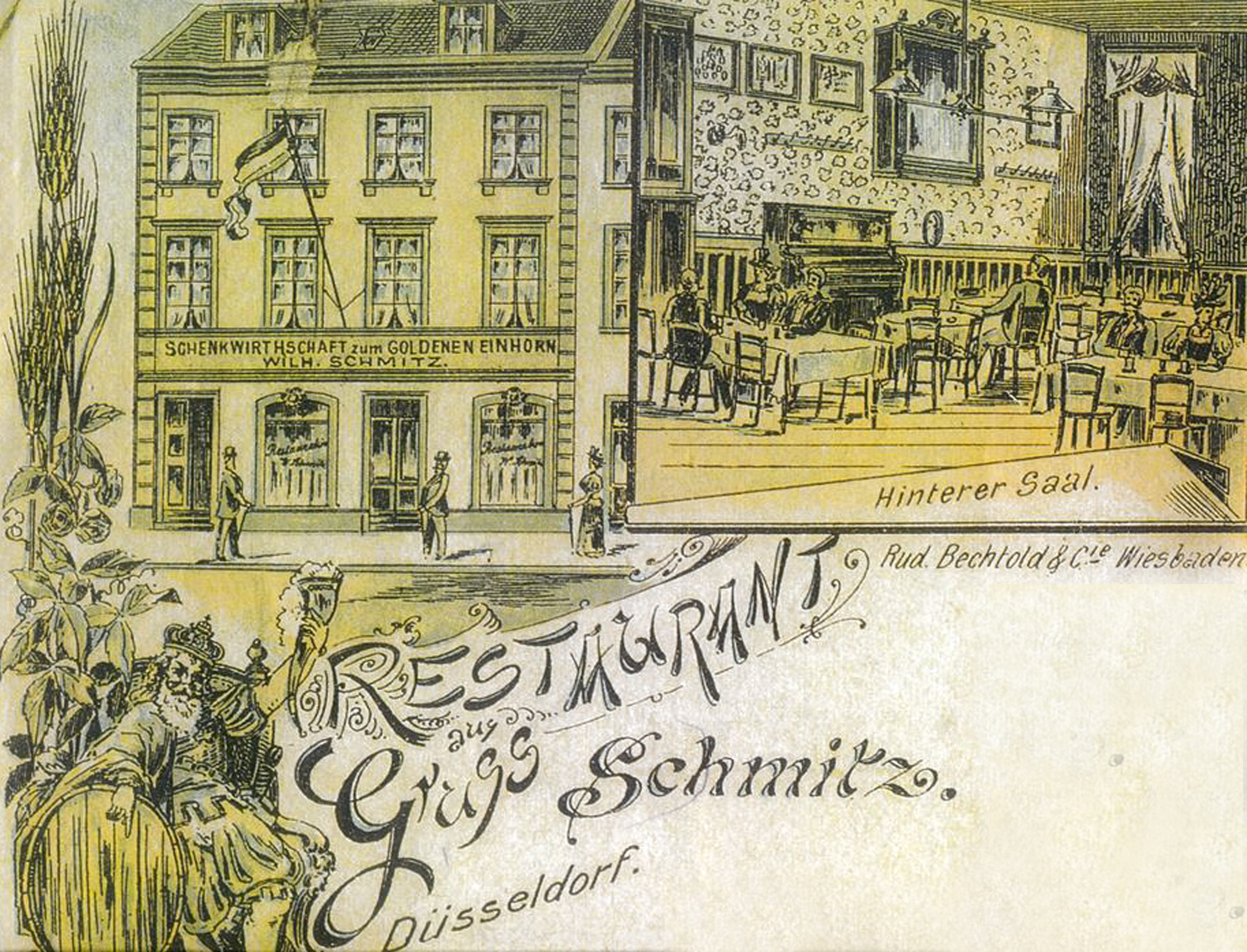 Zum Goldenen Einhorn, Außen- und Innenansicht, Ratinger Straße 18, Düsseldorf